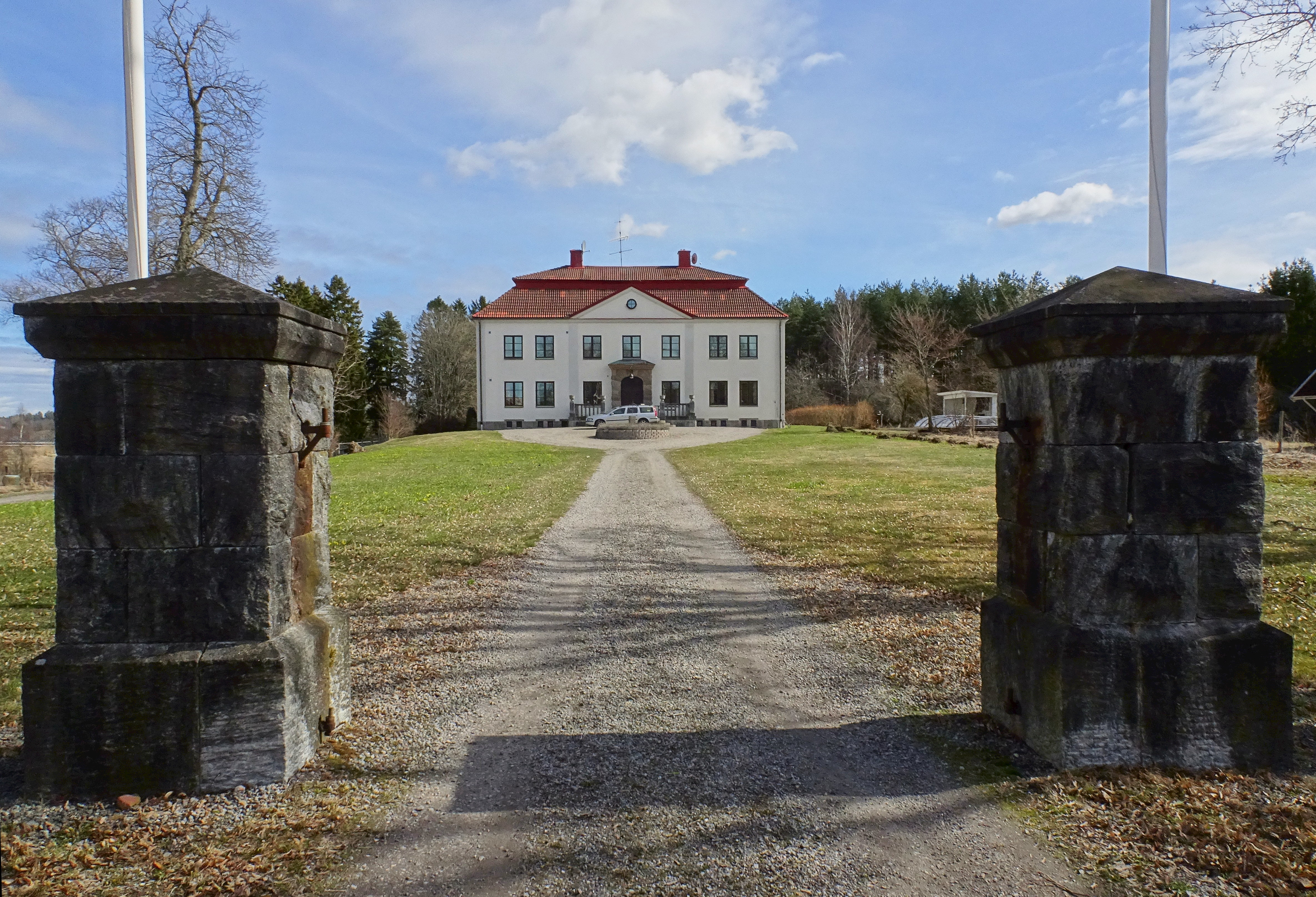 Edeby säteri, huvudbyggnad